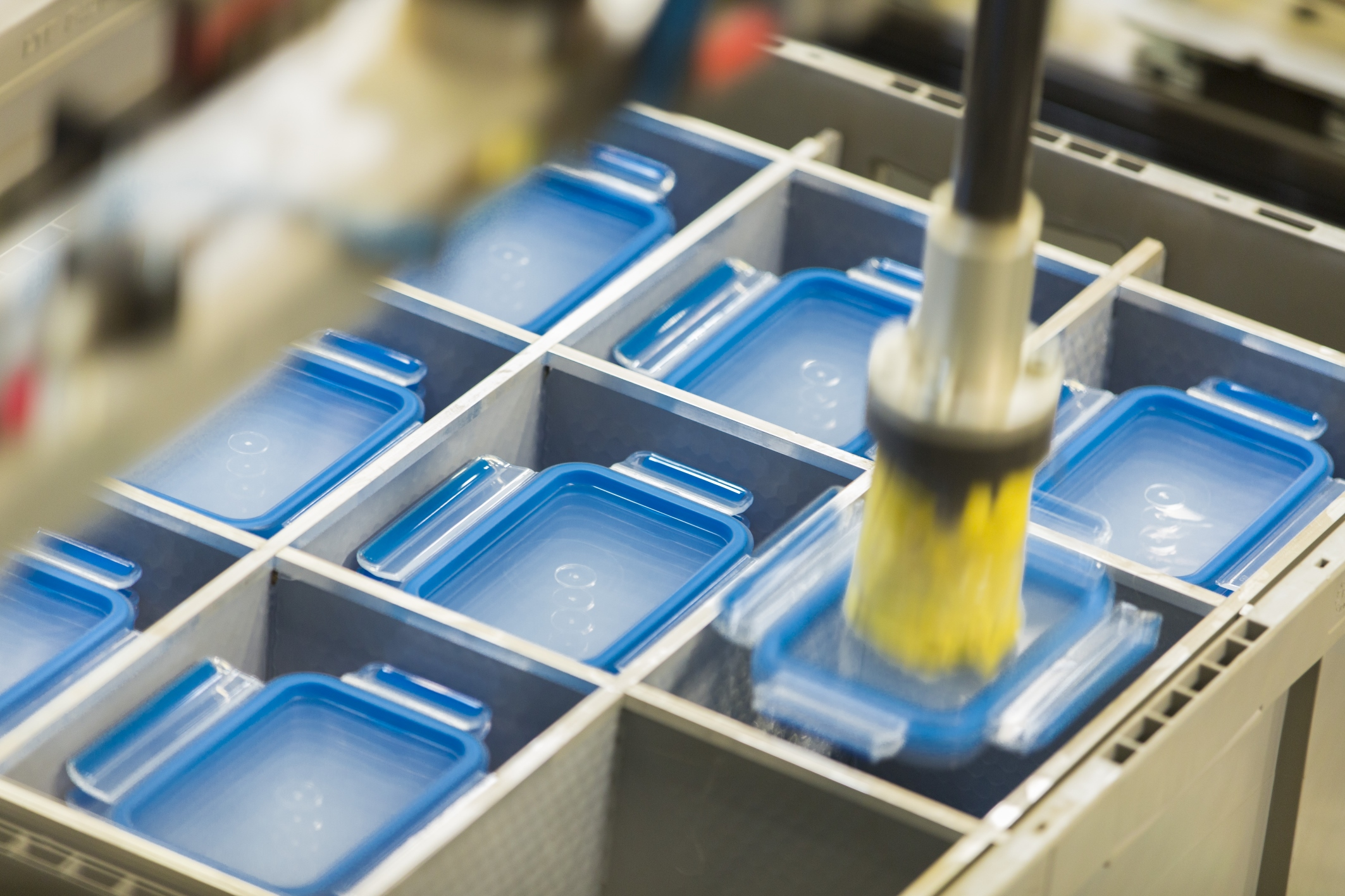 Produktion der Clip & Close Frischhaltedose von Emsa am Produktionsstandort Emsdetten (NRW), Deutschland. Anders als bei herkömmlichen Dichtungen ist die Emsa Frischedichtung untrennbar mit dem Deckel verbunden und lückenlos in den Deckel eingespritzt. Das Ergebnis: Keine Zwischenräume, in denen Keime haften können.